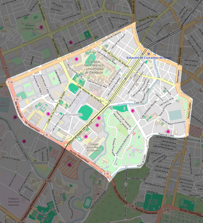 Mapa del distrito de Universidad en Zaragoza.